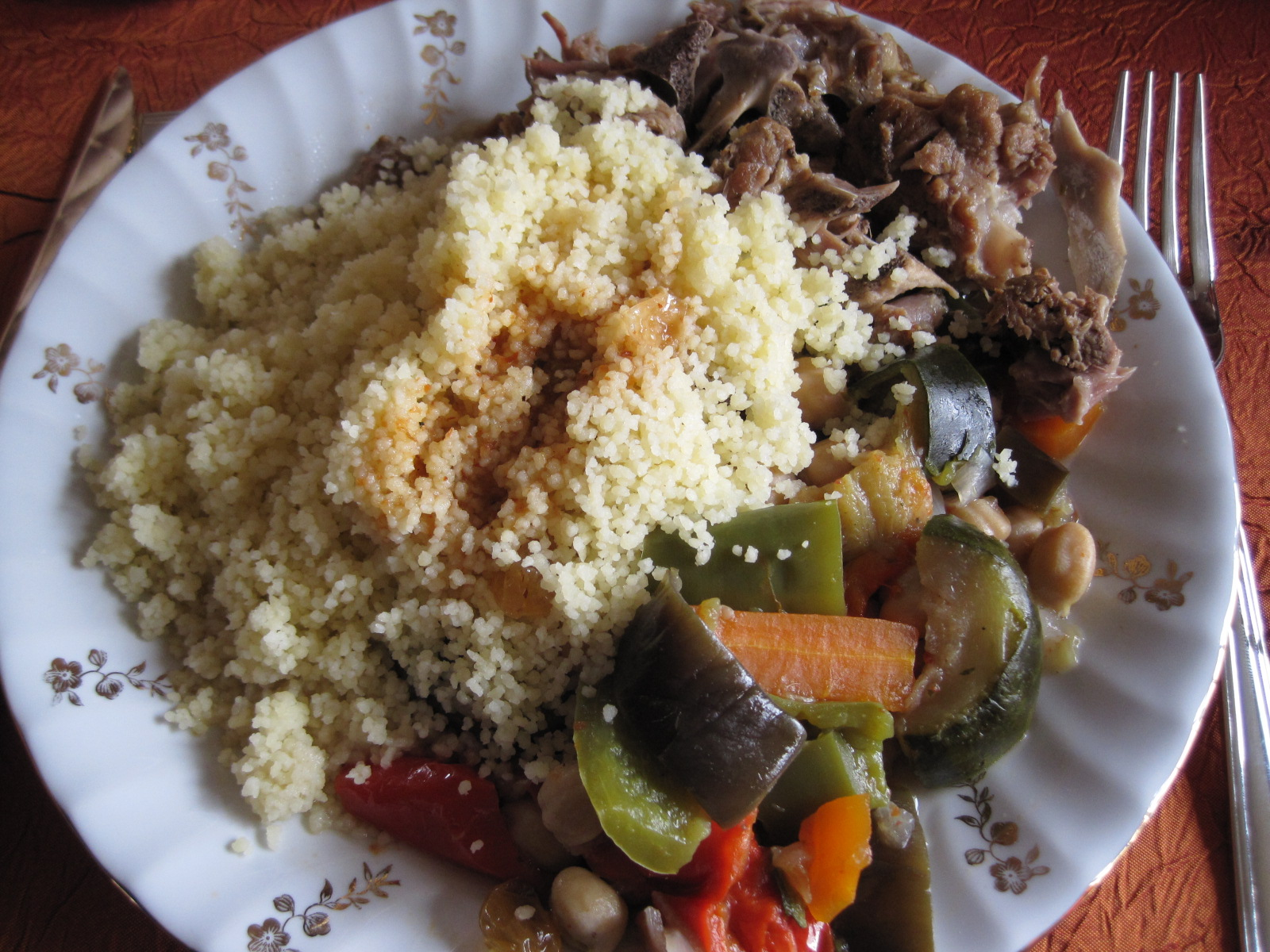 Couscous au mouton de Maurice